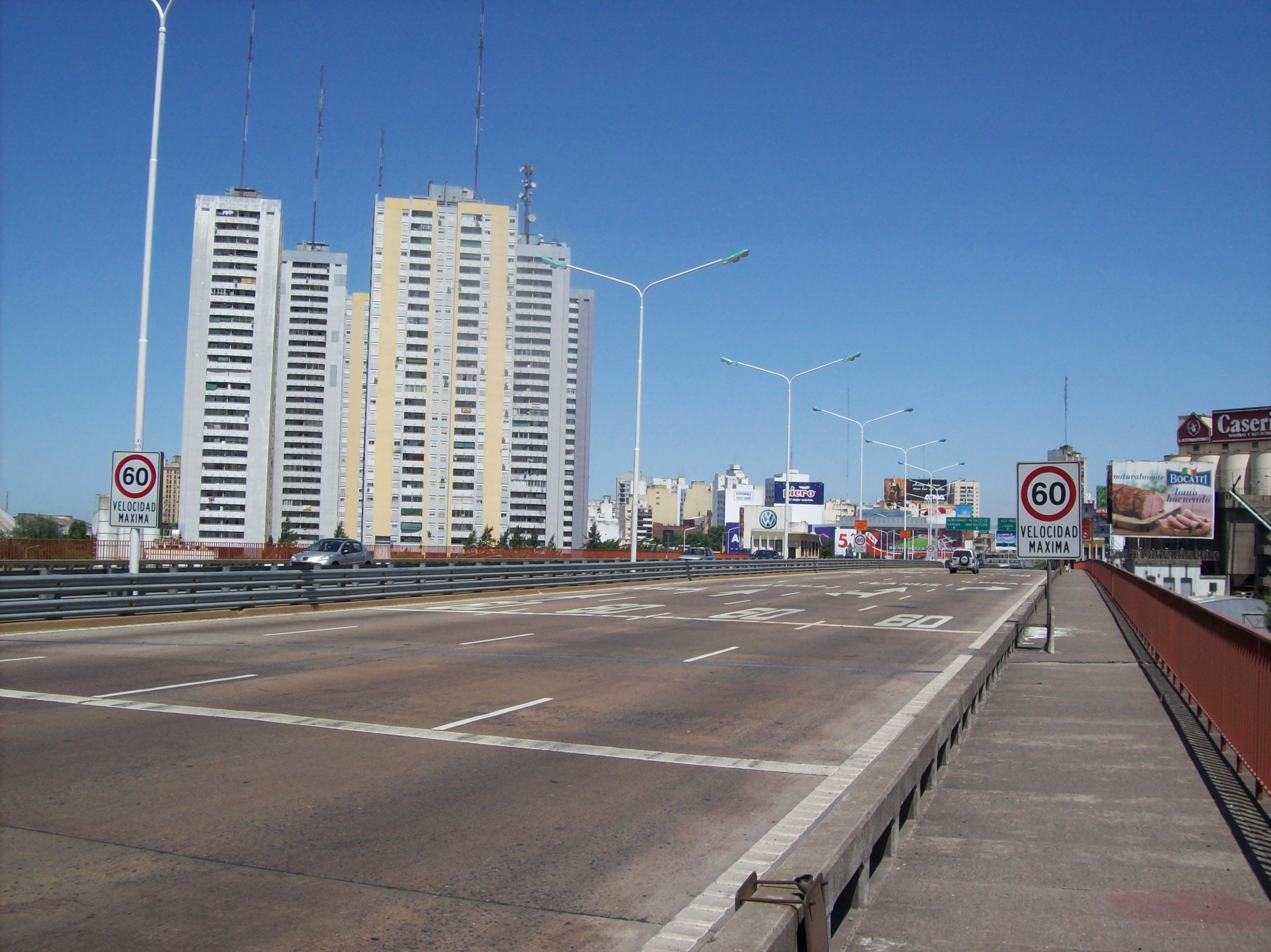 Calzada y vereda del Nuevo Puente Pueyrredón sobre el Riachuelo, entre el barrio porteño de Barracas y la ciudad de Avellaneda. A la izquierda, las Torres Pueyrredón.